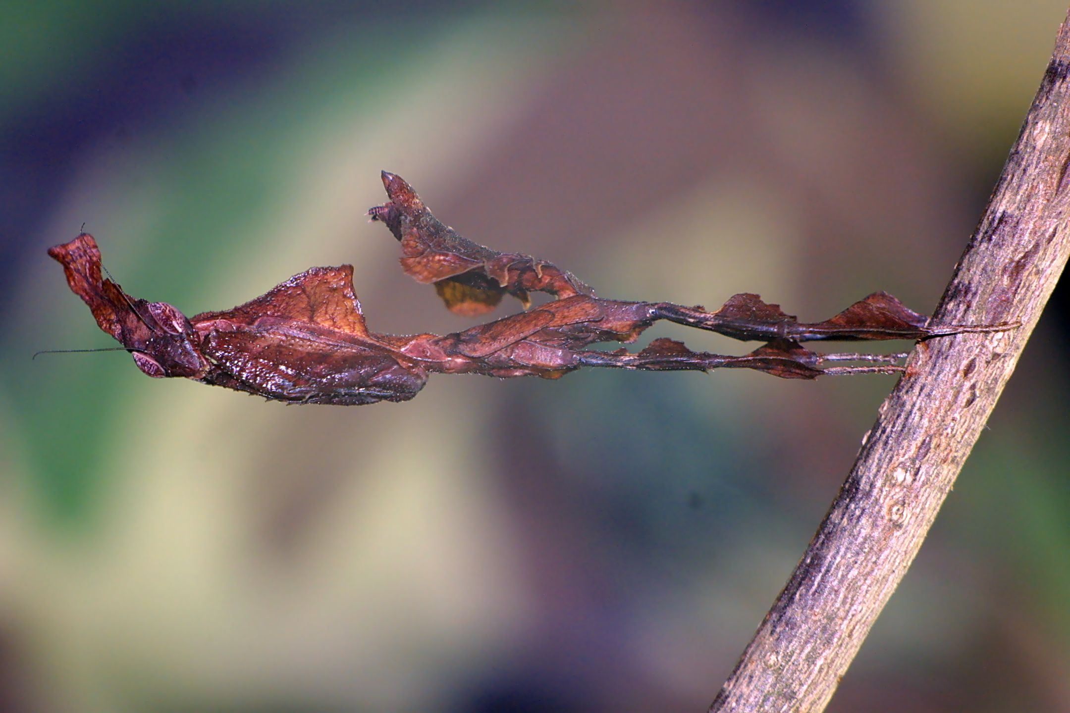 Phyllocrania Paradoxa (Subadult)